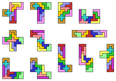 Решение задачи об одновременном утроении всех 12 фигур пентамино 9 комплектами фигур